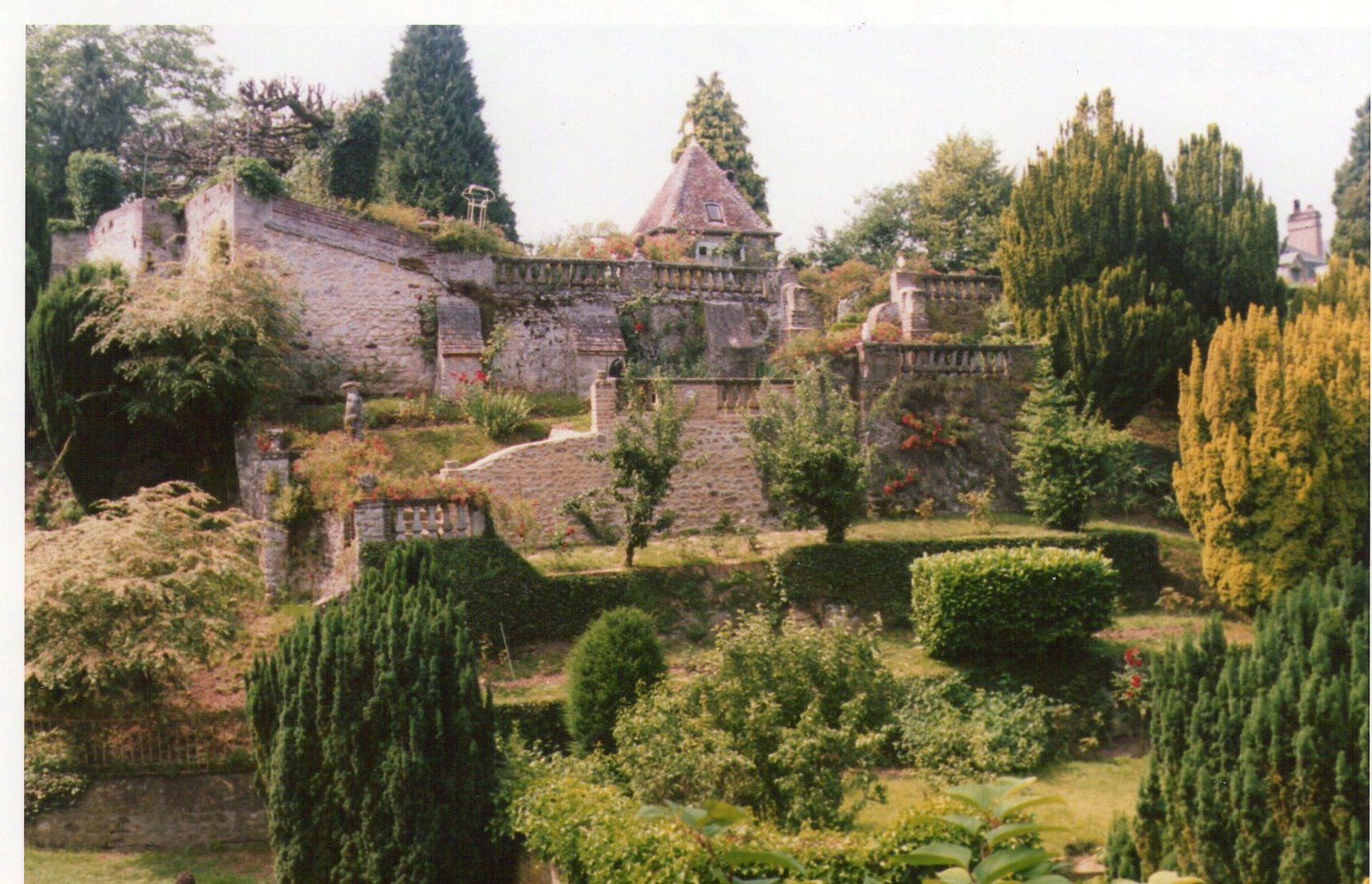 Jardins Henri-Le Sidaner, à Gerberoy (département de l'Oise, en France).]